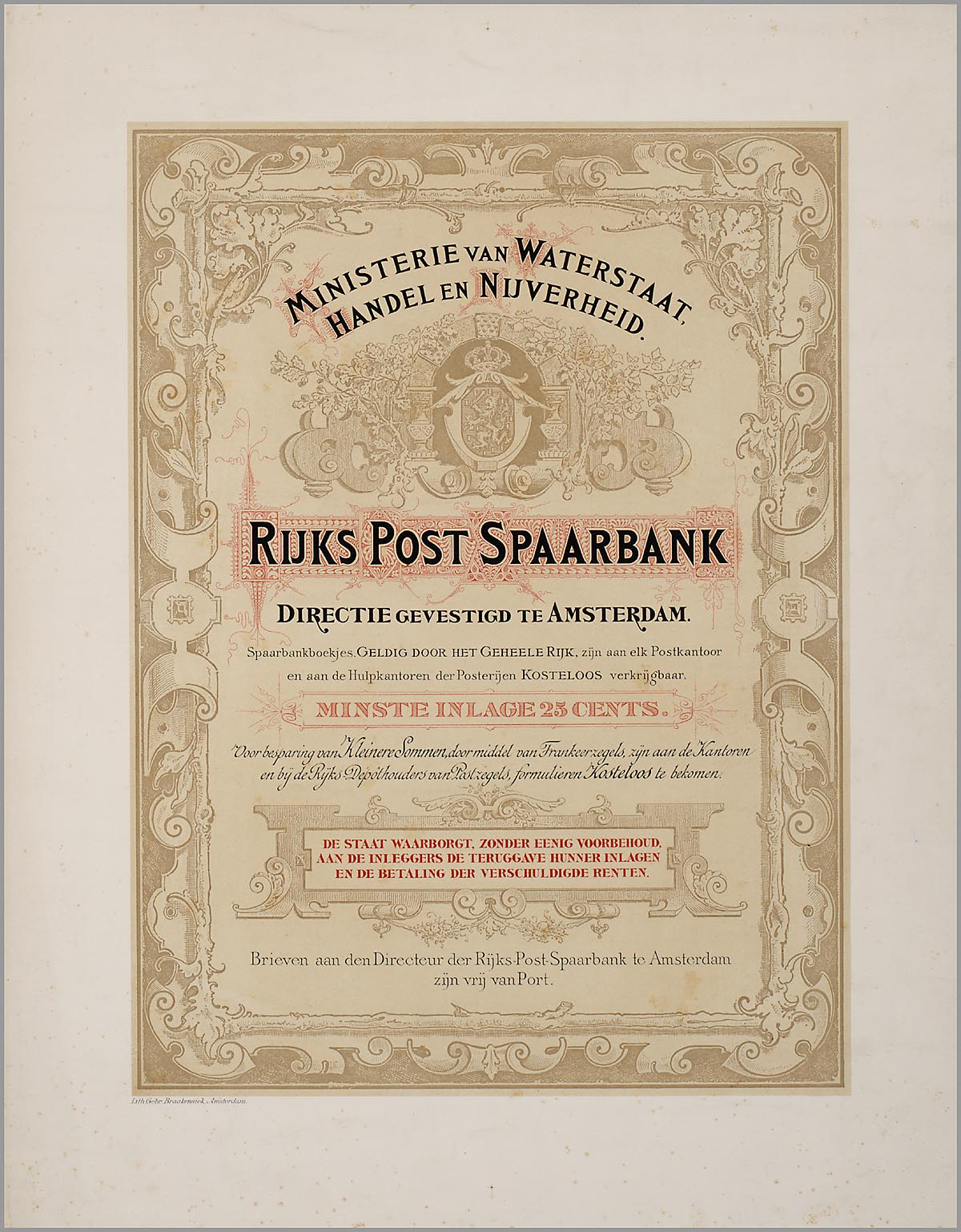 Affiche: Spaarbankboekjes, Geldig door het Geheele Rijk, zijn aan elk Postkantoor en aan de Hulpkantoren der Posterijen Kosteloos verkrijgbaar. Minste inlage 25 cents. Voor...